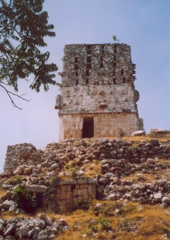 Labna, El Mirador, a maya site